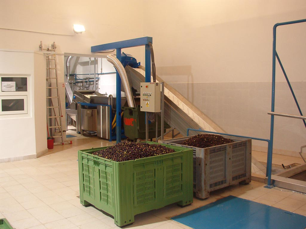 Pogon za preradu maslina i prozvodnju maslinovog ulja